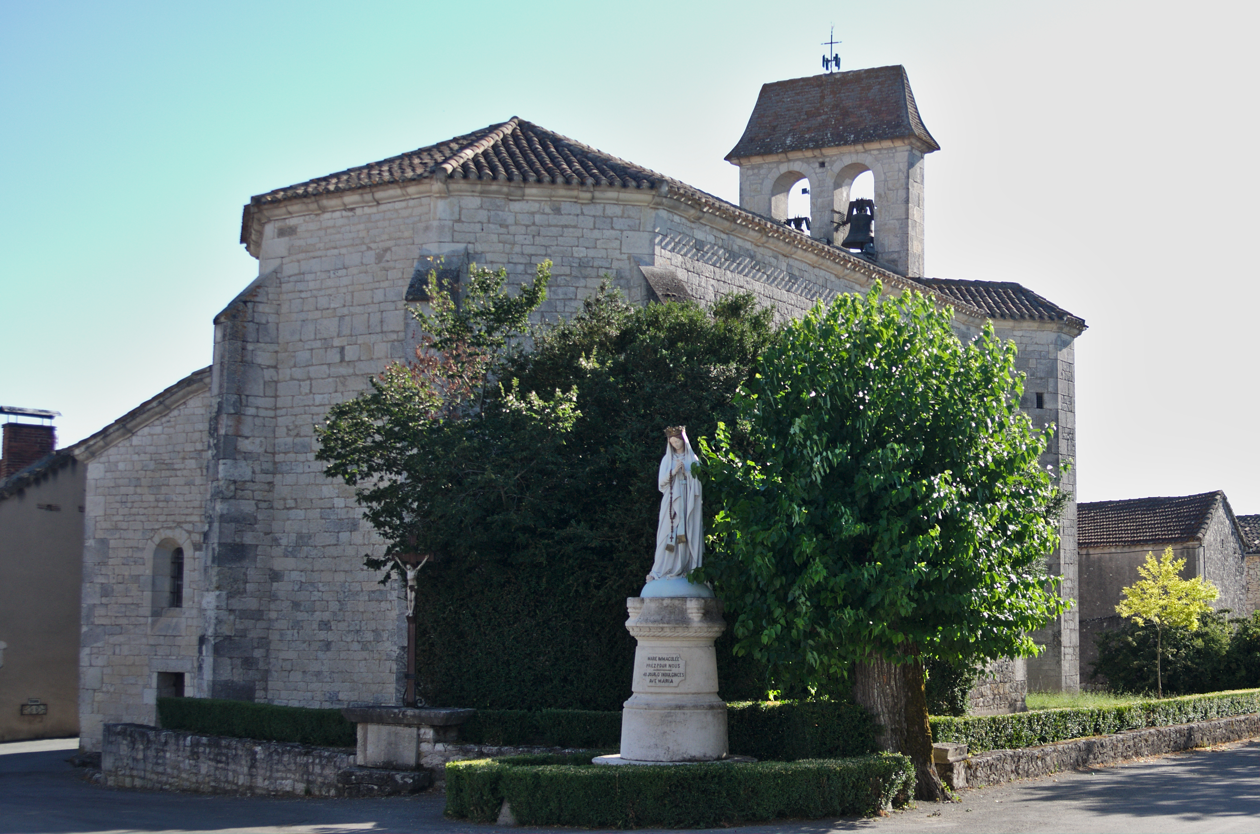 01082013 - Église de Villesèque